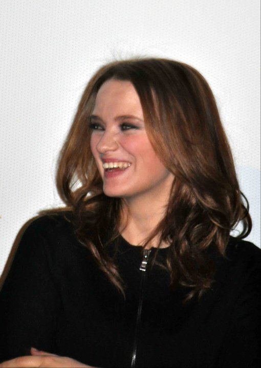 Sara Forestier à l'avant-première du film "Le Nom des gens"